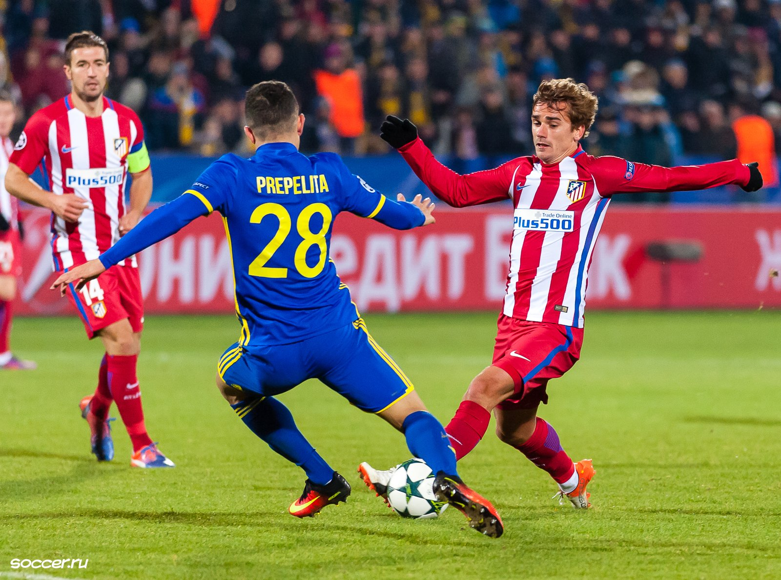 «Ростов» — «Атлетико» (19.10.2016)